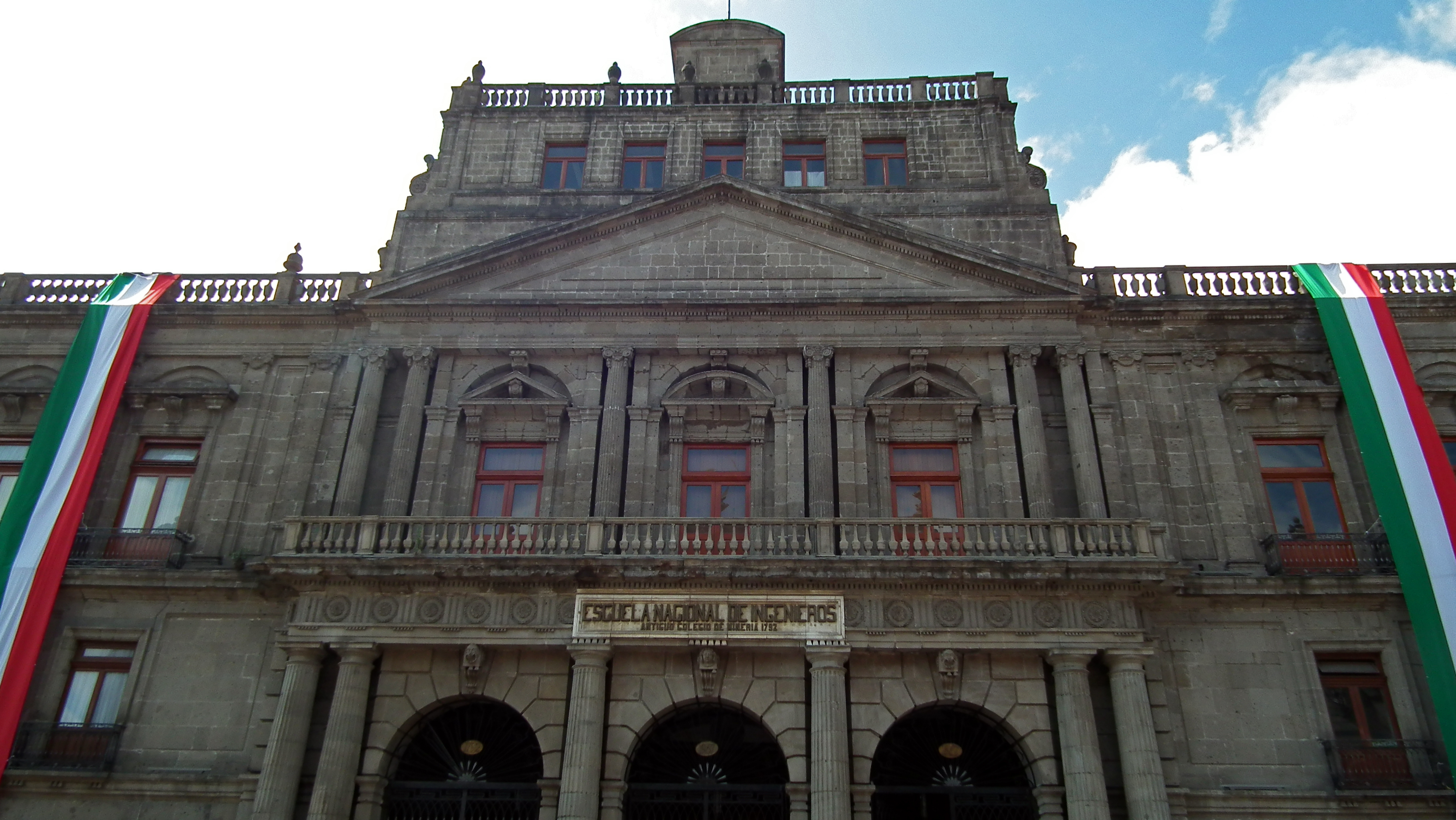 Construido por el Arquitecto Manuel Tolsá en el siglo XVIII. Parte frontal al centro del edificio